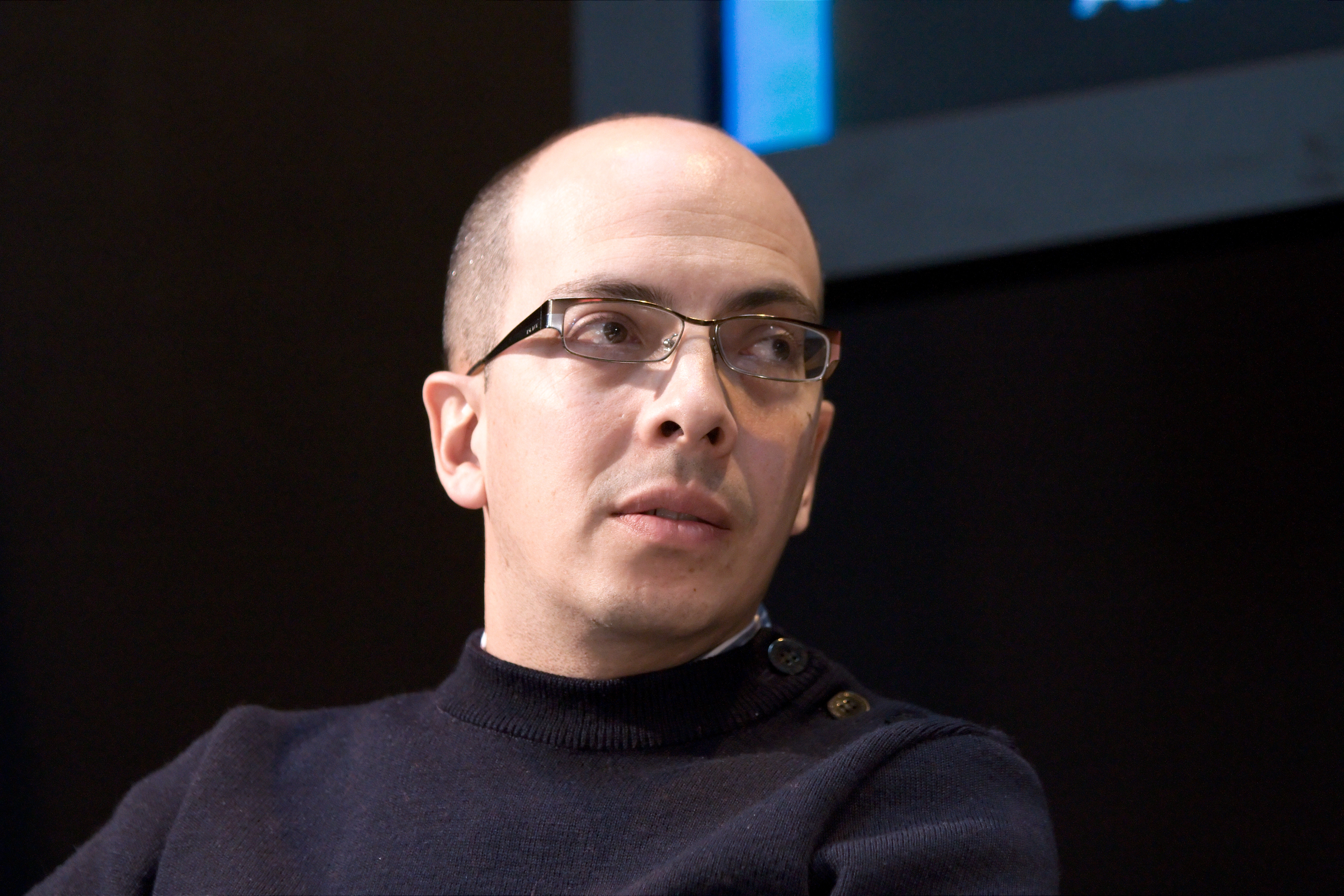 L'auteur mexicain Jorge Volpi au Salon du livre de Paris lors de la conférence La société, source d'inspiration.